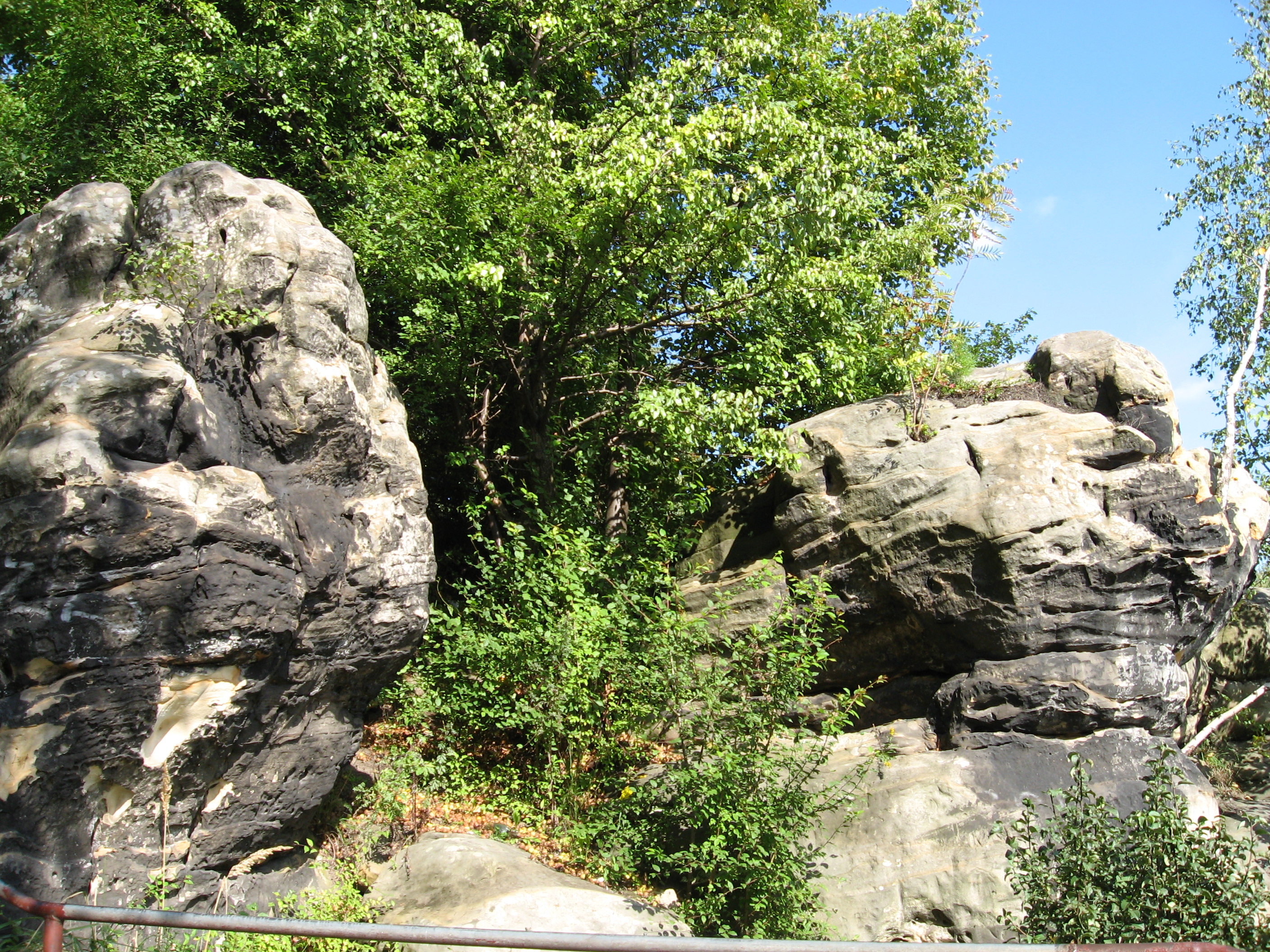 Unikalne odsłonięcie geologiczne przy Al. Armii Krajowej w Starachowicach (pomnik przyrody nieożywionej). Długość- 400m, Wysokość- 5-8m